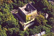 Schloss Bockflies